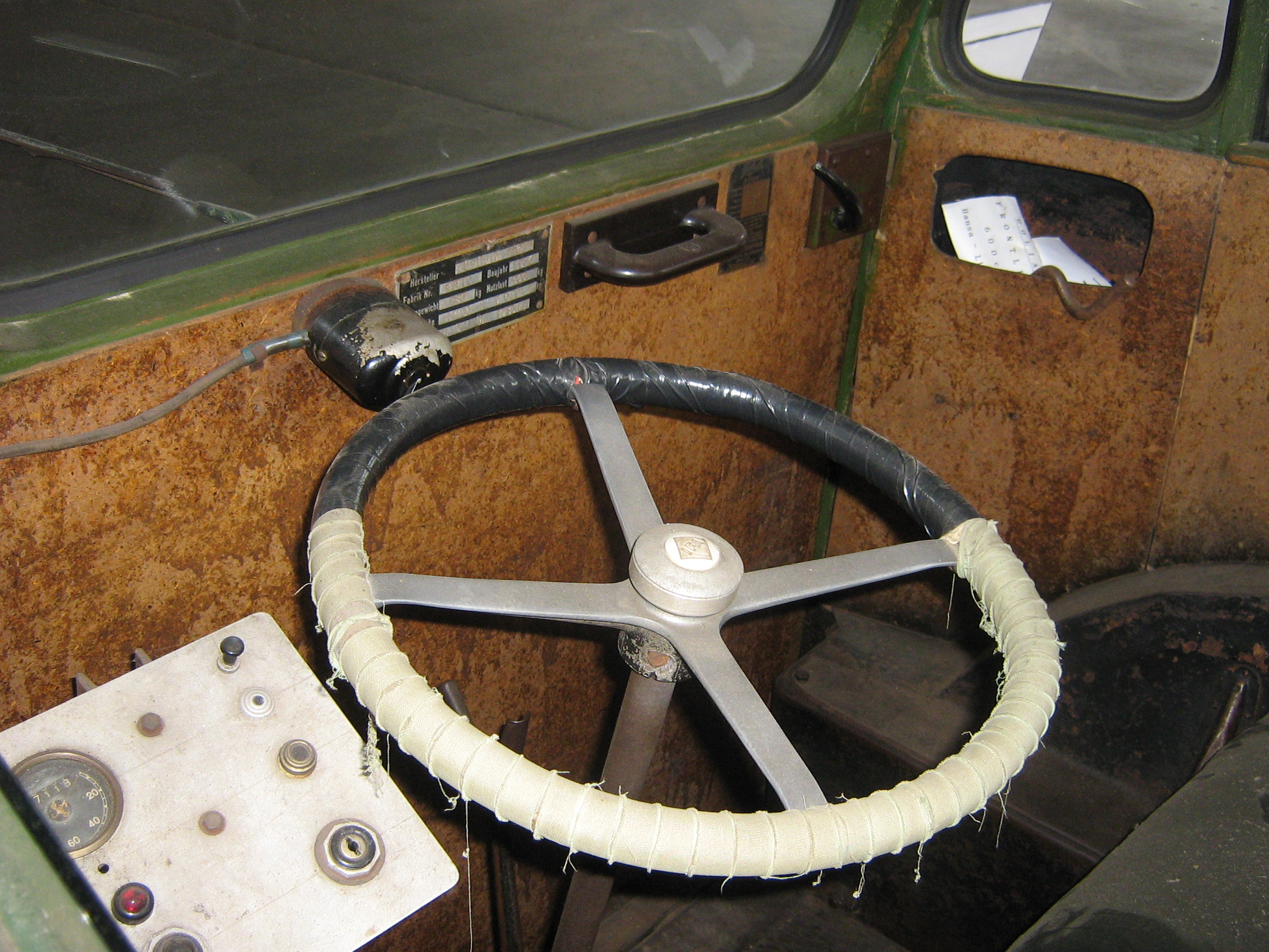 1934 Goliath